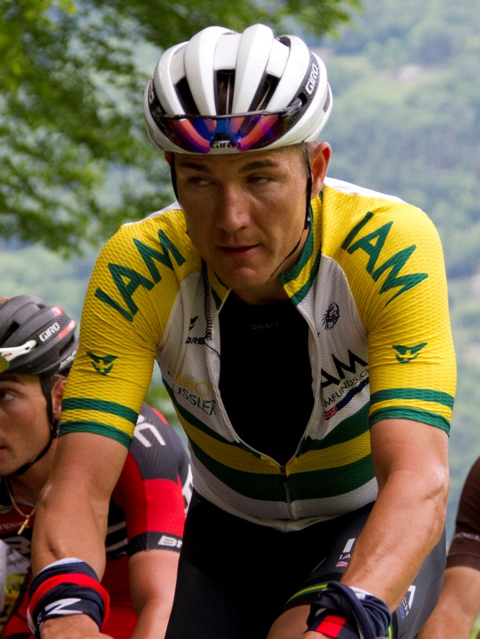 203 haussler